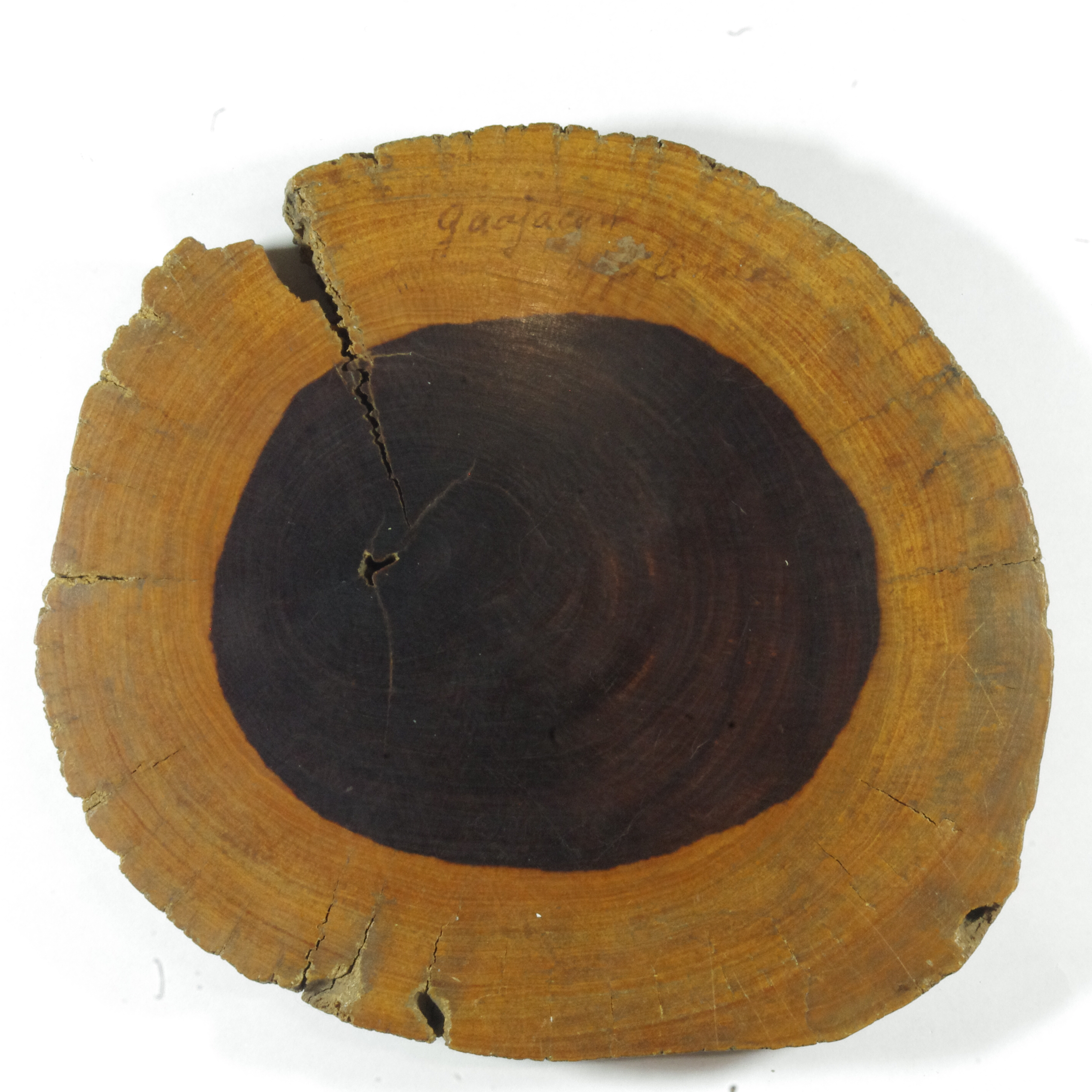 Поперечный спил Guaiacum officinale из коллекции Кафедры Ботаники Томского Государственного университета. Был сделан в 1878 (или, что менее вероятно, в 1838) году.